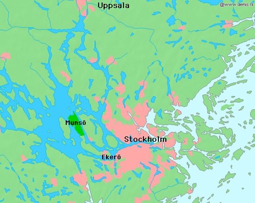 Munsö (Ekerö kommun) in Lake Mälaren